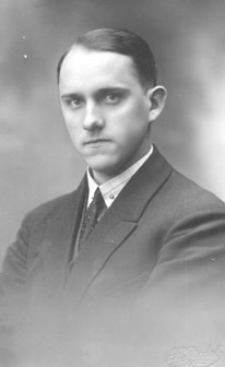 Julius Mägiste, eesti keeleteadlane